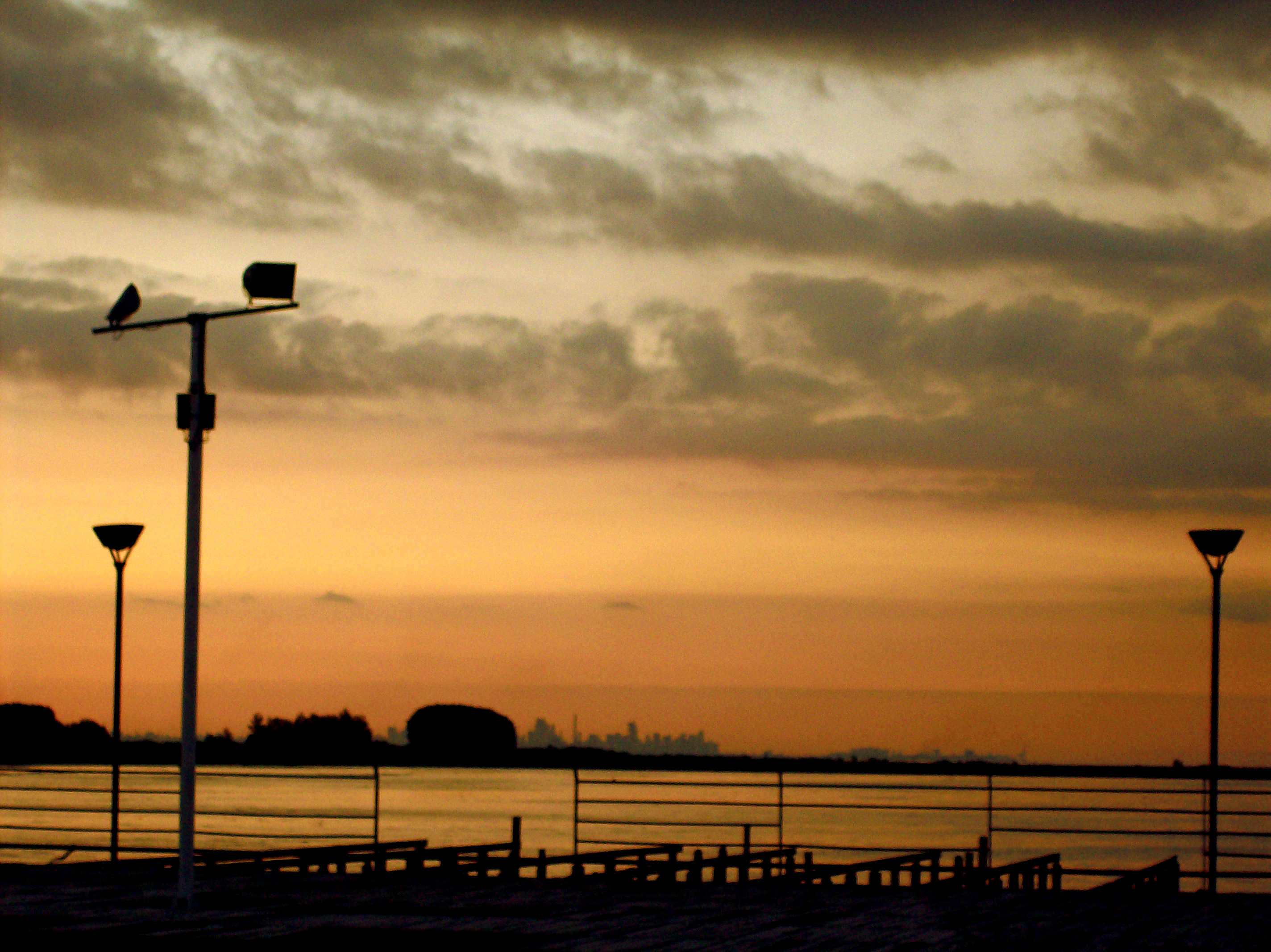 Rio de la Plata Quilmes Argentina